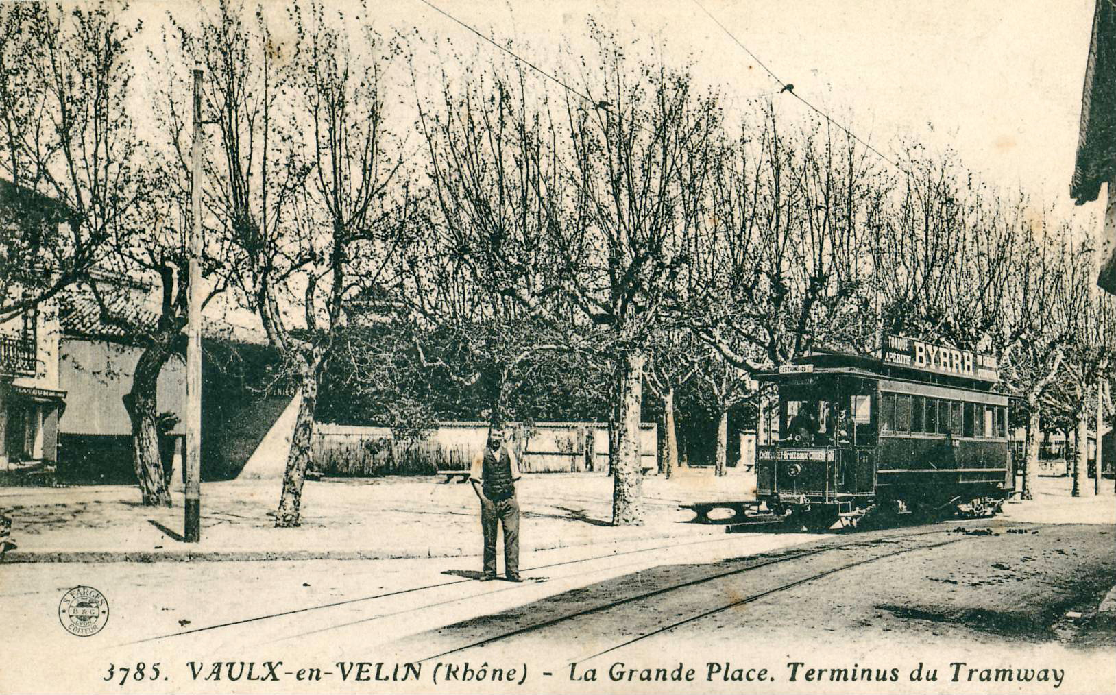 Carte postale ancienne éditée par S. Farges / B & G à Lyon, n°3785 : VAULX-EN-VELIN - La Grande Place - Terminus du Tramway Il s'agit de la ligne 27 initialement exploitée par la Compagnie Lyonnaise de Tramways (CLT), qui a fusionnée avec l'OTL en 1906.